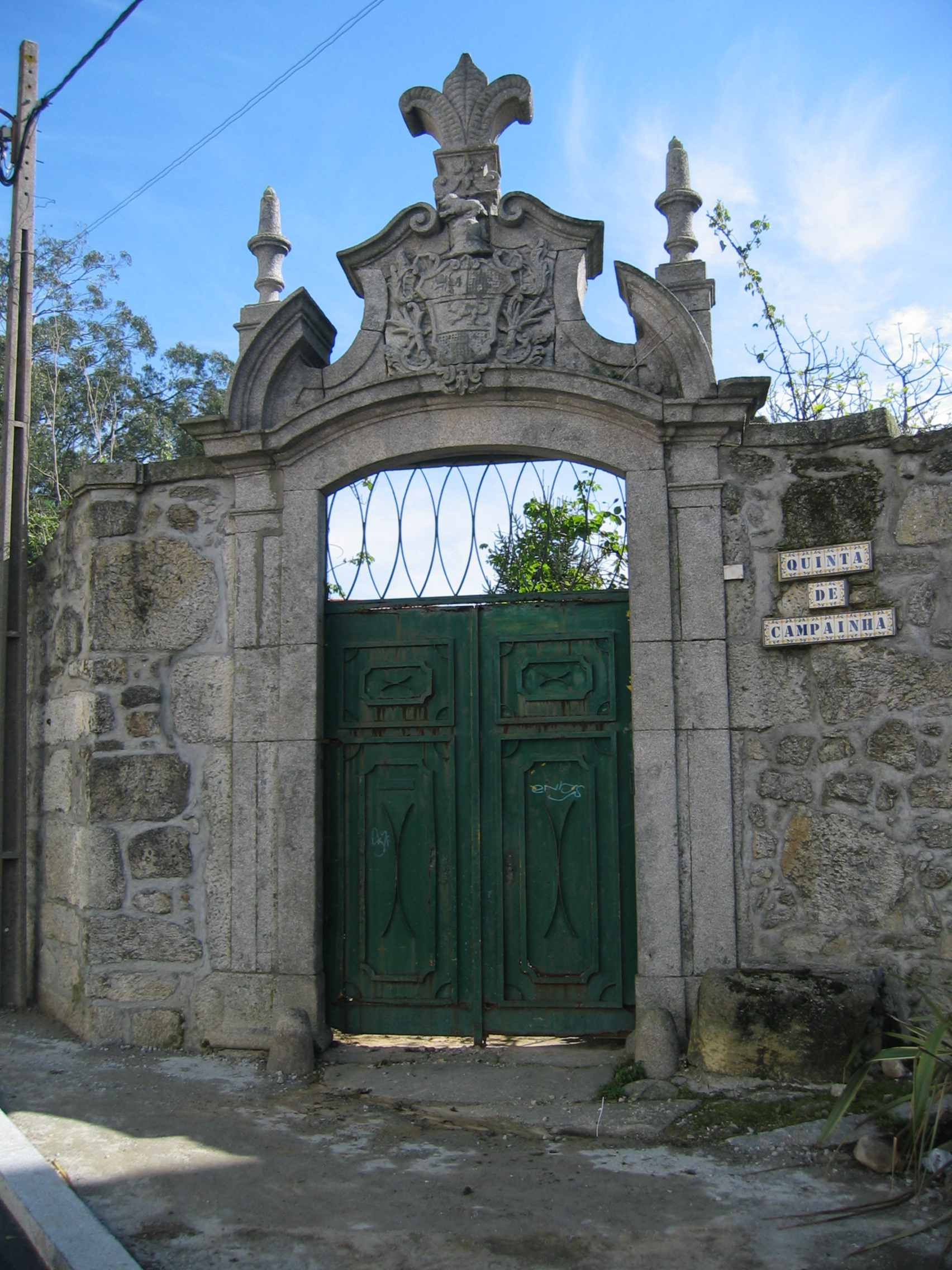 Quinta da Campaínha - Rio Tinto - Portugal